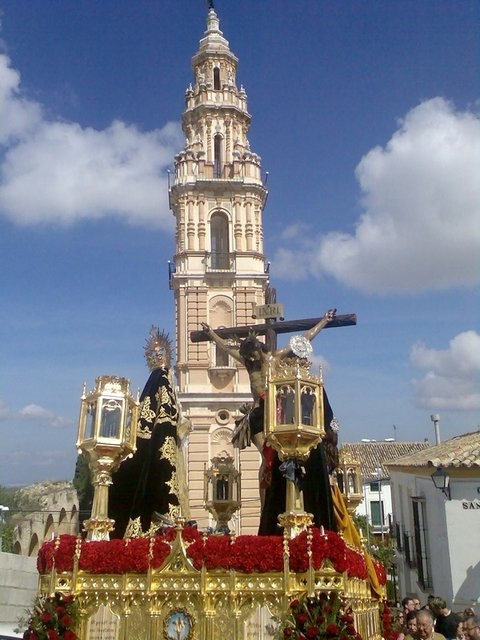 Salida Extraordinaria de Hermandad del Calvario (Estepa) debido a las condiciones climatológicas dadas en su estación de penitencia en la Semana Santa de 2008